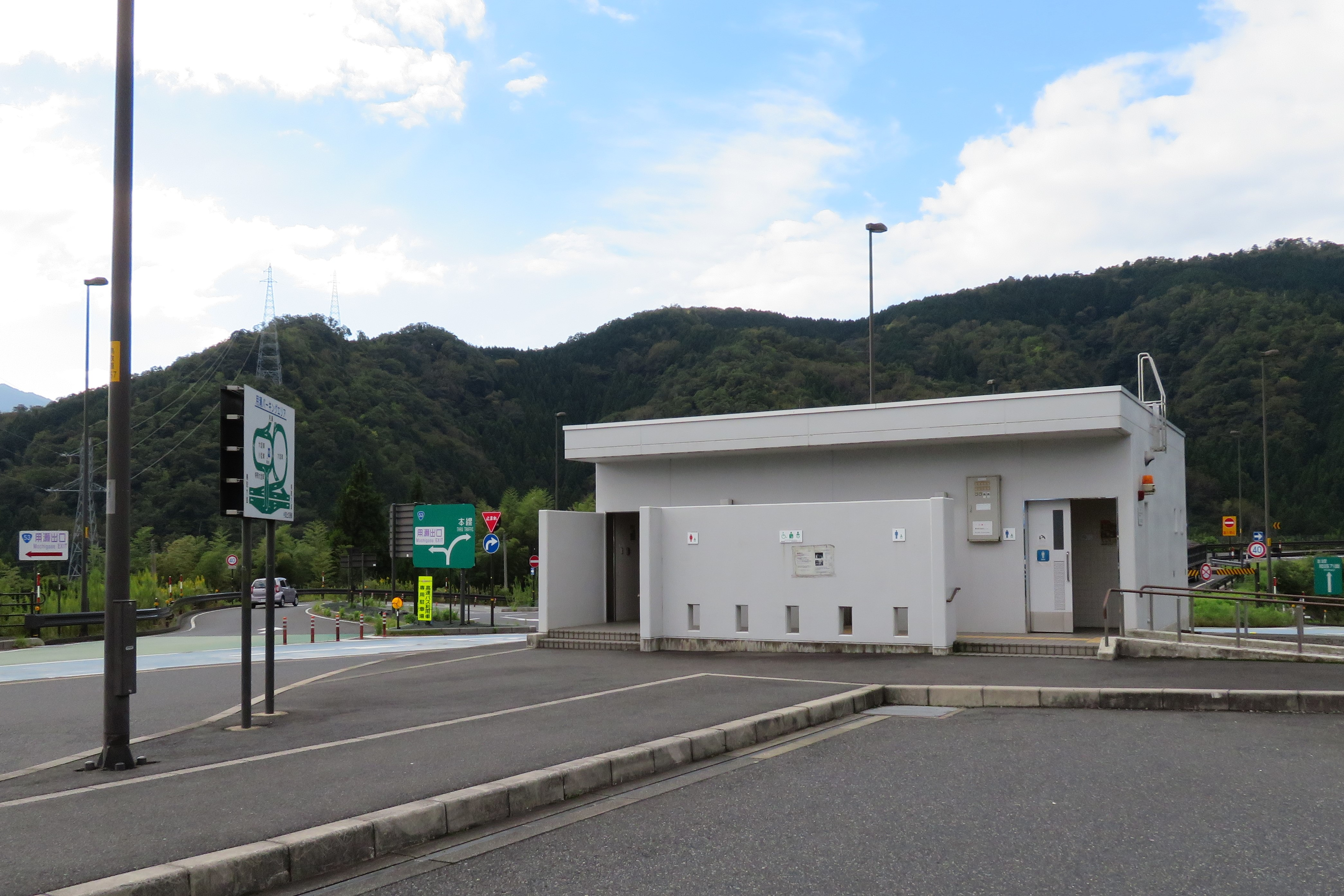 鳥取道用瀬パーキングエリア